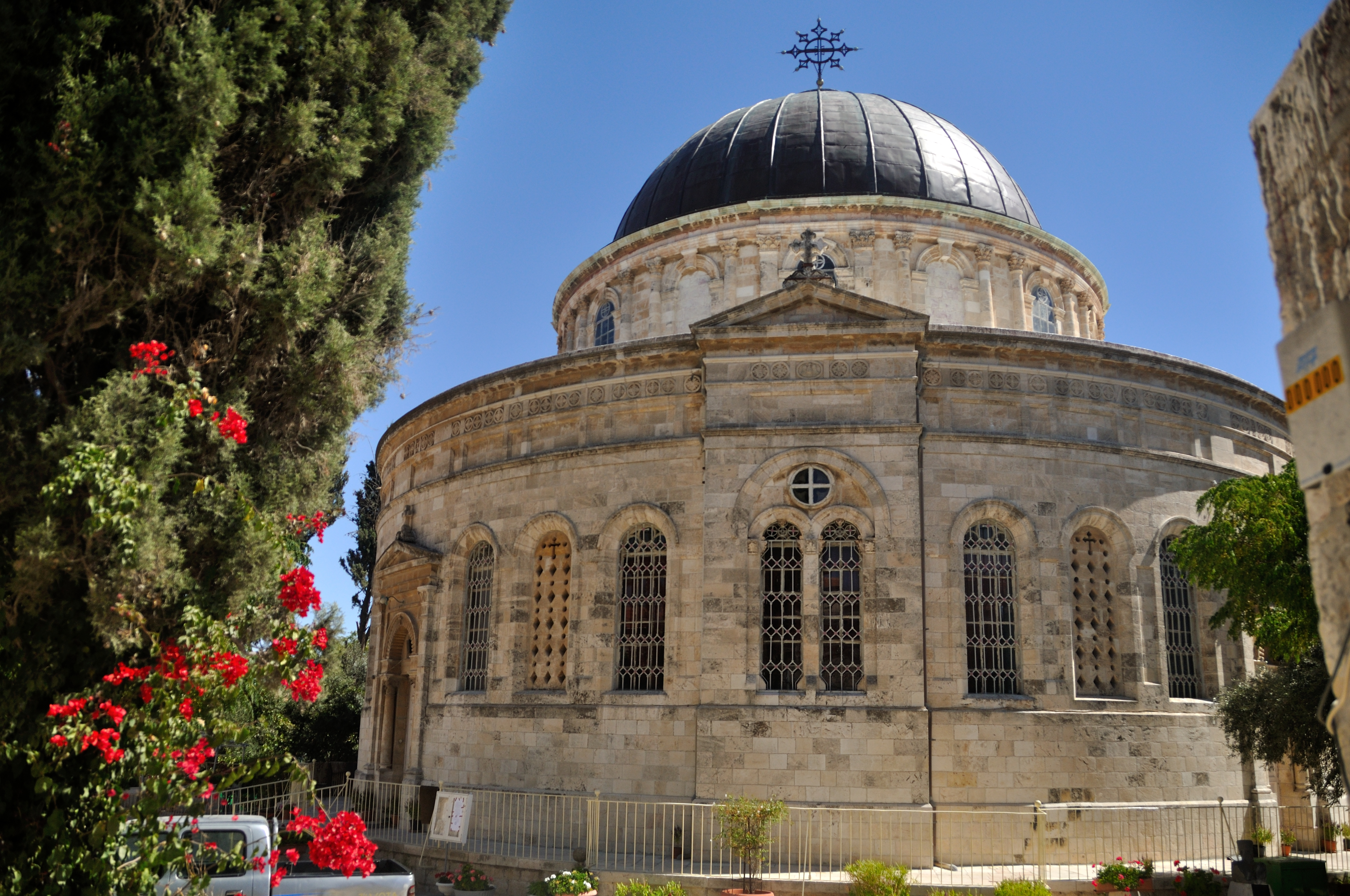 הכנסייה האתיופית או כנסיית קִידאנה מִהְרַת (ברית הרחמים) היא כנסייה שנבנתה ברחוב אתיופיה 10 בירושלים, במימון יוהנס הרביעי, קיסר אתיופיה. צורתה עגולה, הגג מכוסה בכיפה שחורה ועליה צלב אתיופי במרכזה. מעל לכניסות לגברים ולנשים מוצב תבליט של אריה וכתובת בשפות שונות.